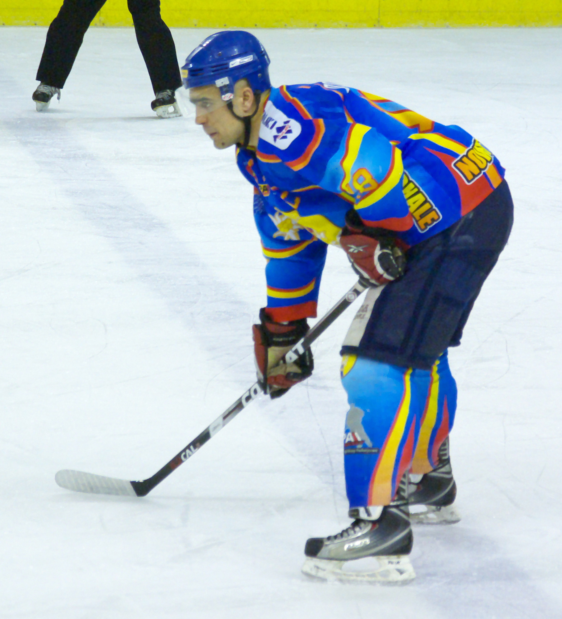 Rafał Dutka podczas meczu KH Sanok - MMKS Podhale Nowy Targ 20 marca 2011.